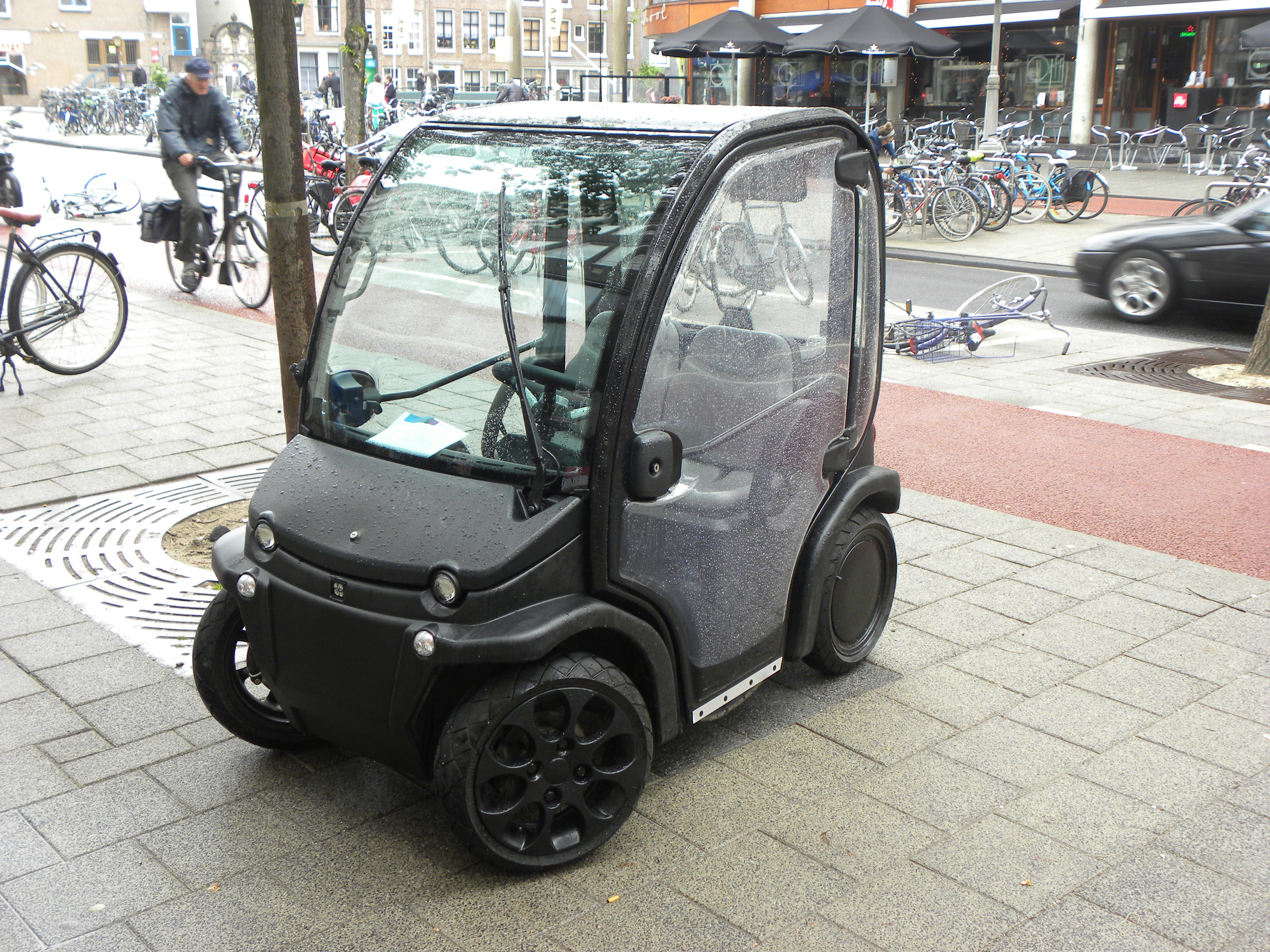 Estrima Biro